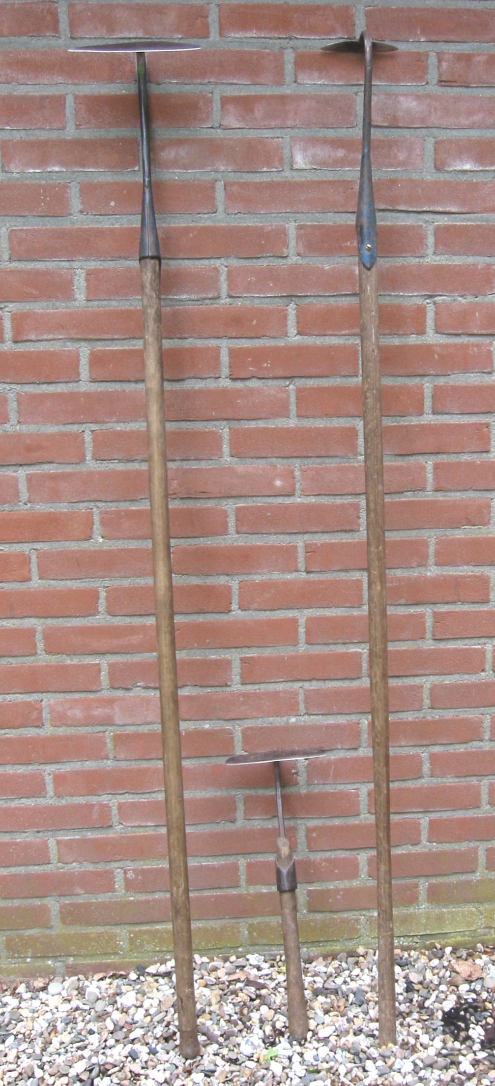 (Hakken) Hoes